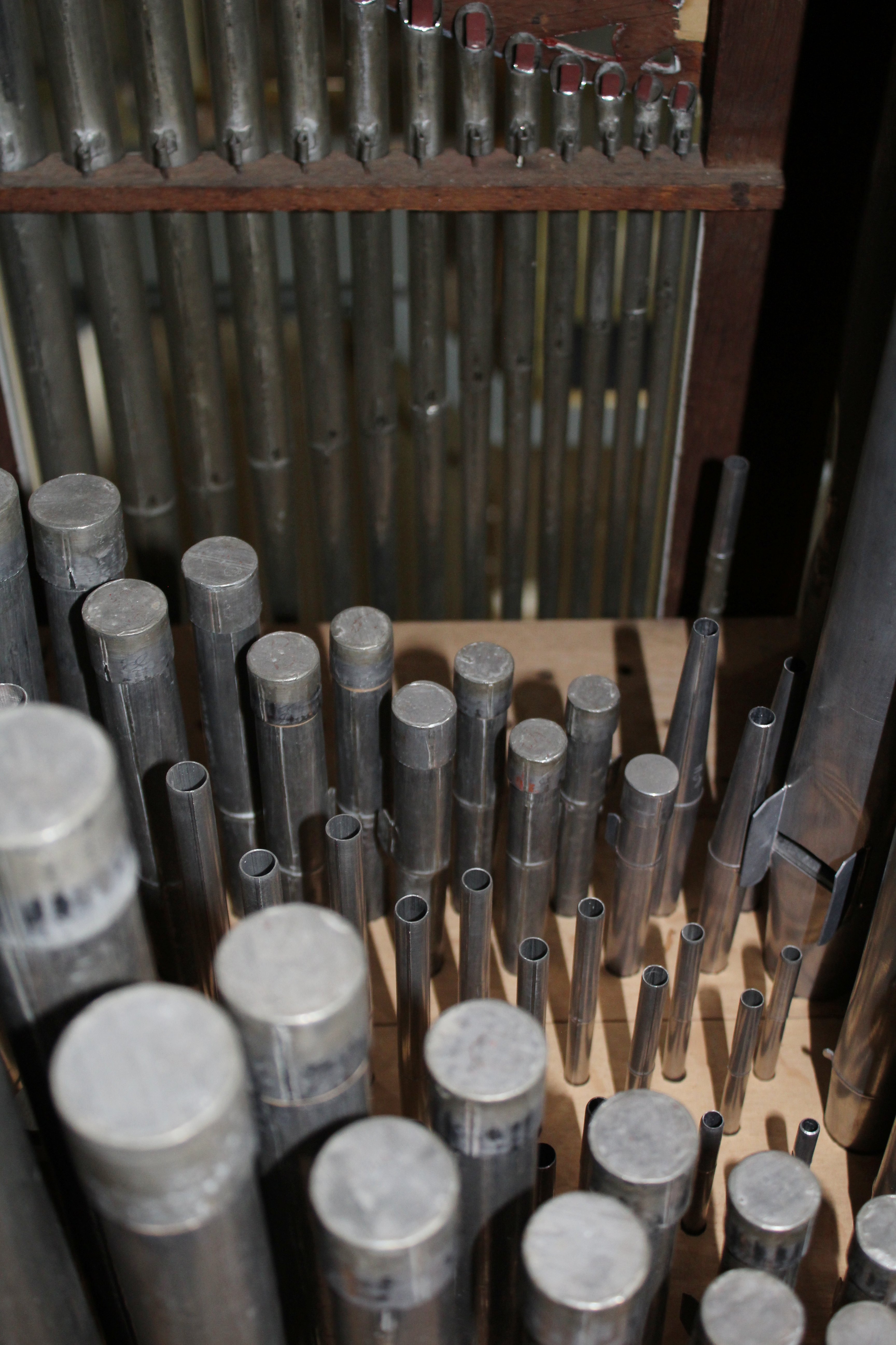 Ev. Kapelle Steinbrücken, Gemeinde Dietzhölztal, Hessen, Deutschland